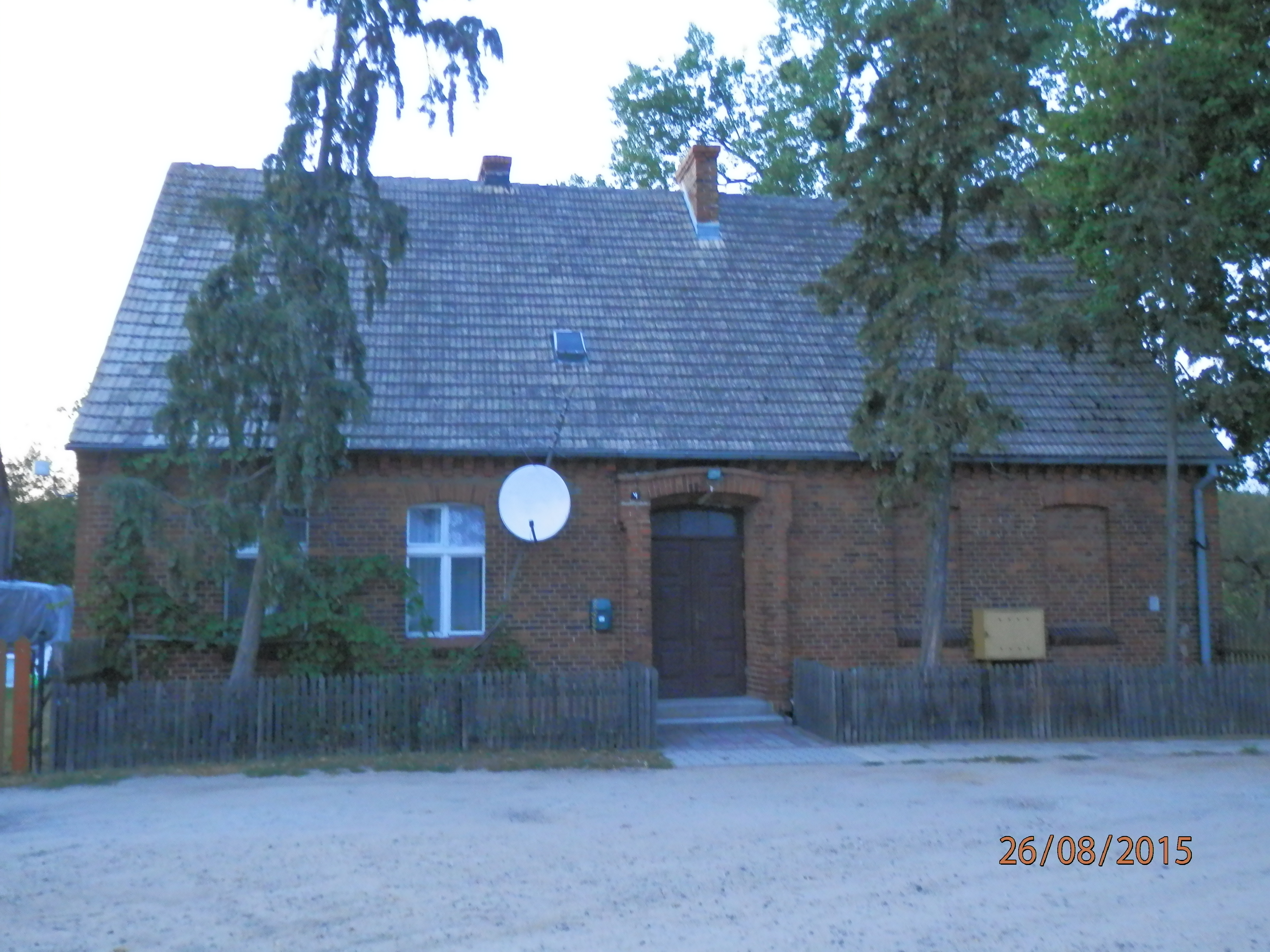 Obecny stan budynku. W porównaniu ze stanem przedwojennym nie ma znaczących zmian.